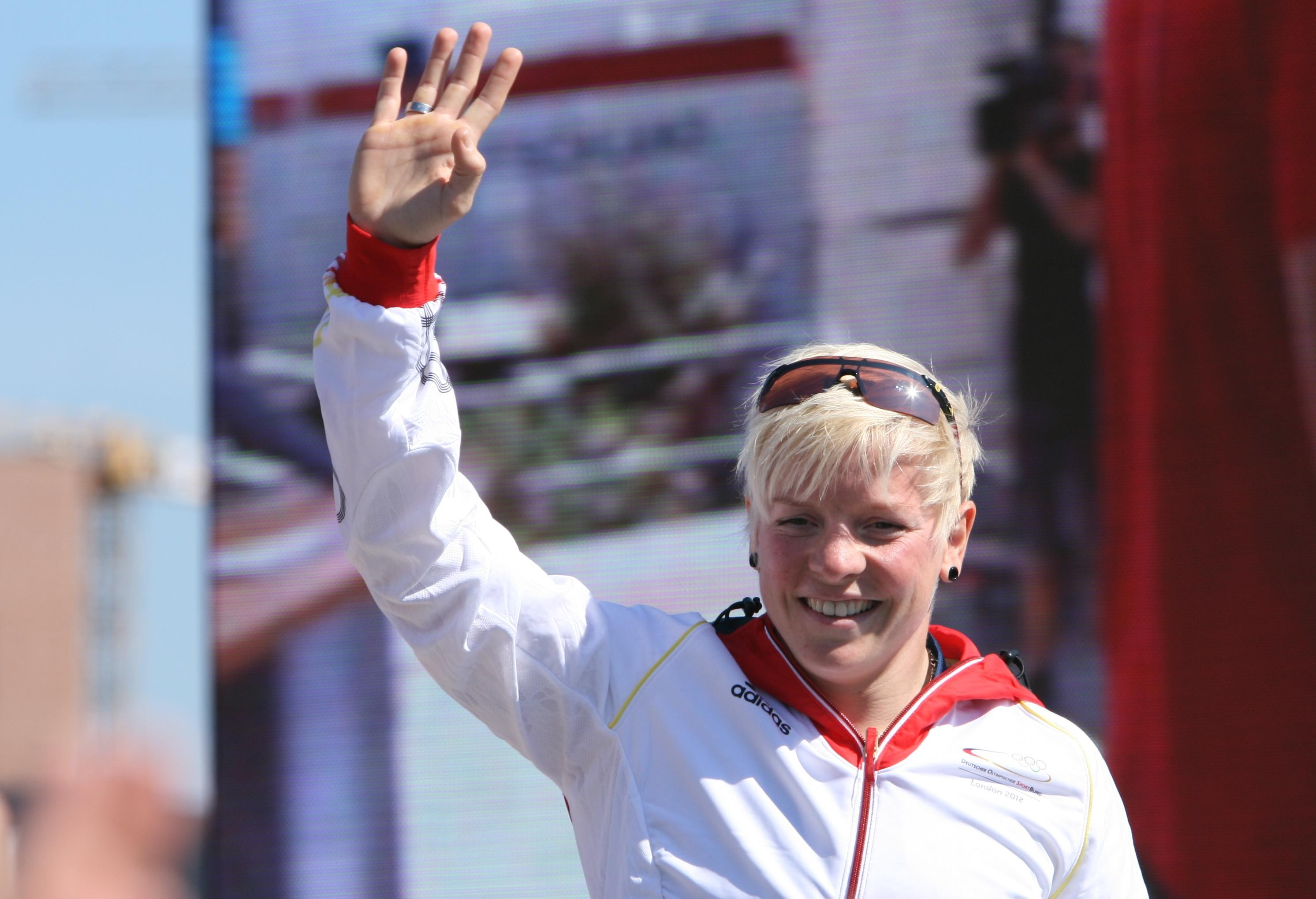 Martina Strutz beim Empfang der Olympioniken 2012 in Hamburg